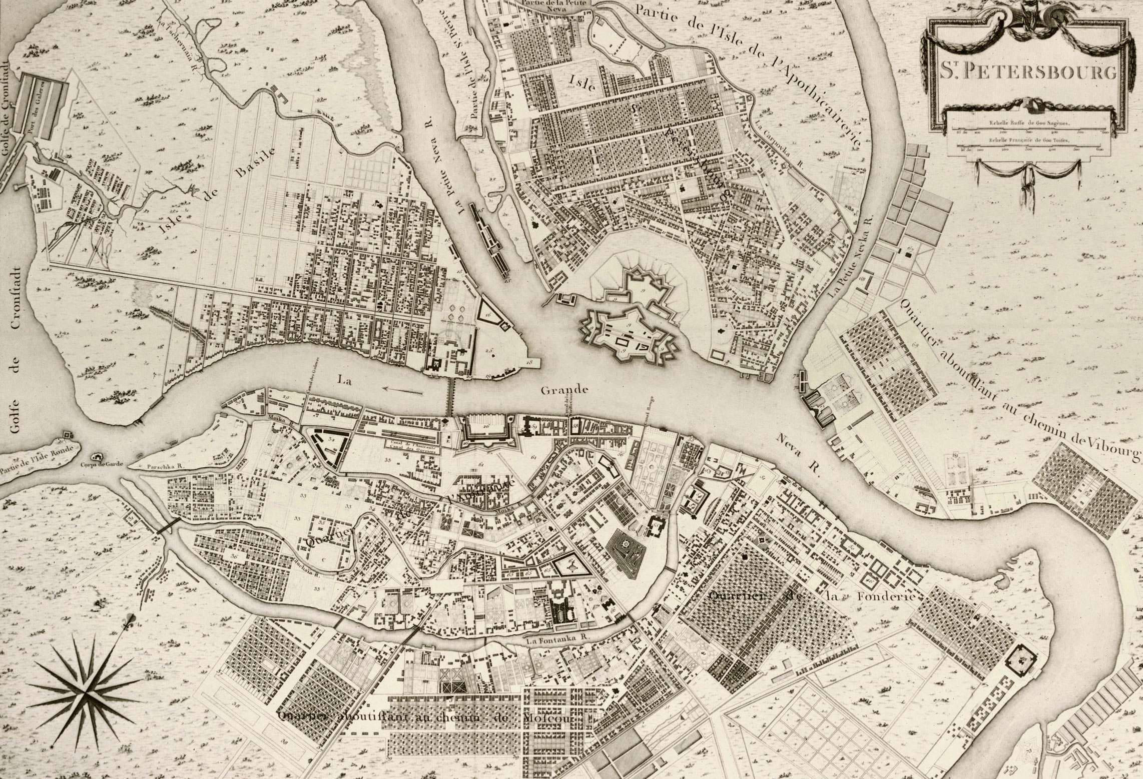 Сокращенный вариант карты Санкт-Петербурга, составленной Академией Наук в 1753